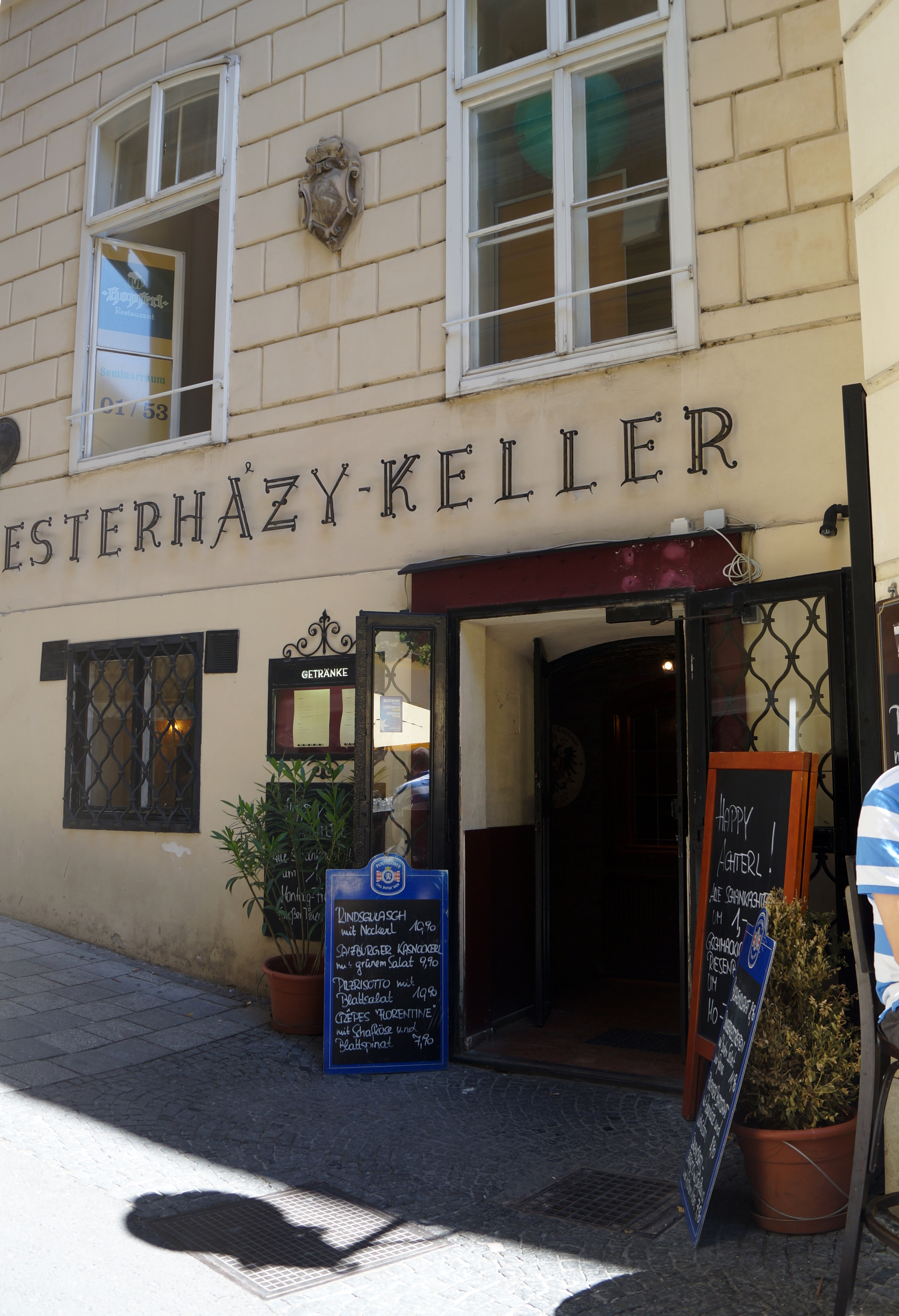 Esterházykeller, historischer Stadtheuriger im 1. Wiener Gemeindebezirk